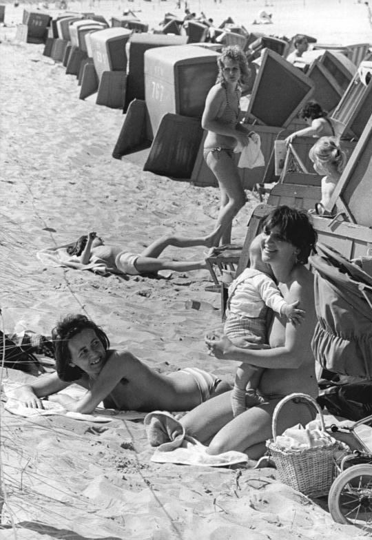 ADN-ZB Sindermann-29.4.87-A-Rostock: Frühlingswetter an der Ostsee - das heißt Beginn der Strandsaison für die Einwohner von Warnemünde.